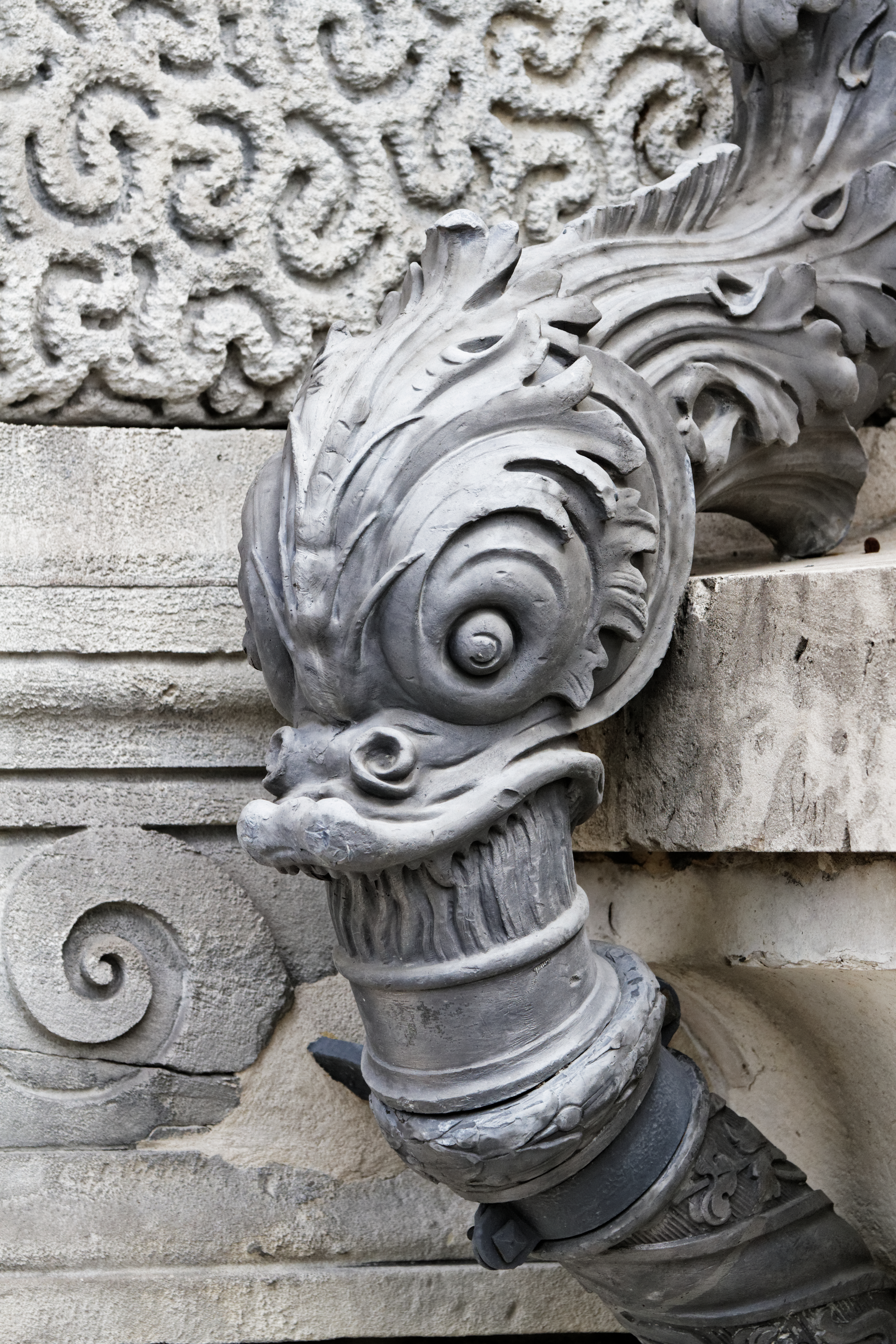 Downspout of Palais du Louvre.